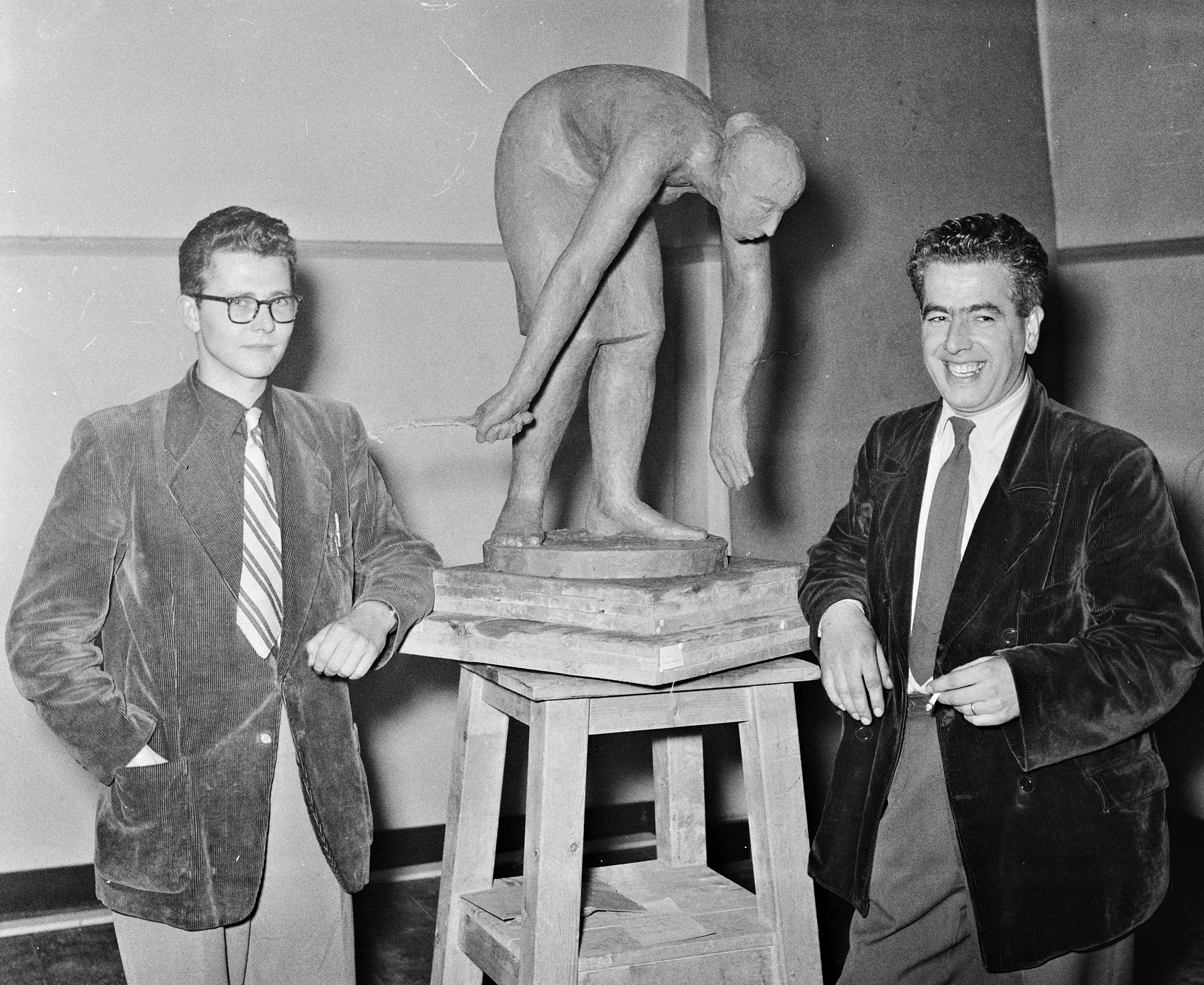 Hans IJdo (links) en Ad Dekkers (rechts) bij de uitreiking van de Prix de Rome in 1953.